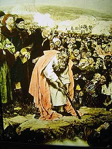 Friedenskirche an der Florastraße in Düsseldorf-Unterbilk, 1896 bis 1899, Architekt Georg Weidenbach, Ansicht eines Wandgemäldes von Eduard von Gebhardt (1838-1925).jpg